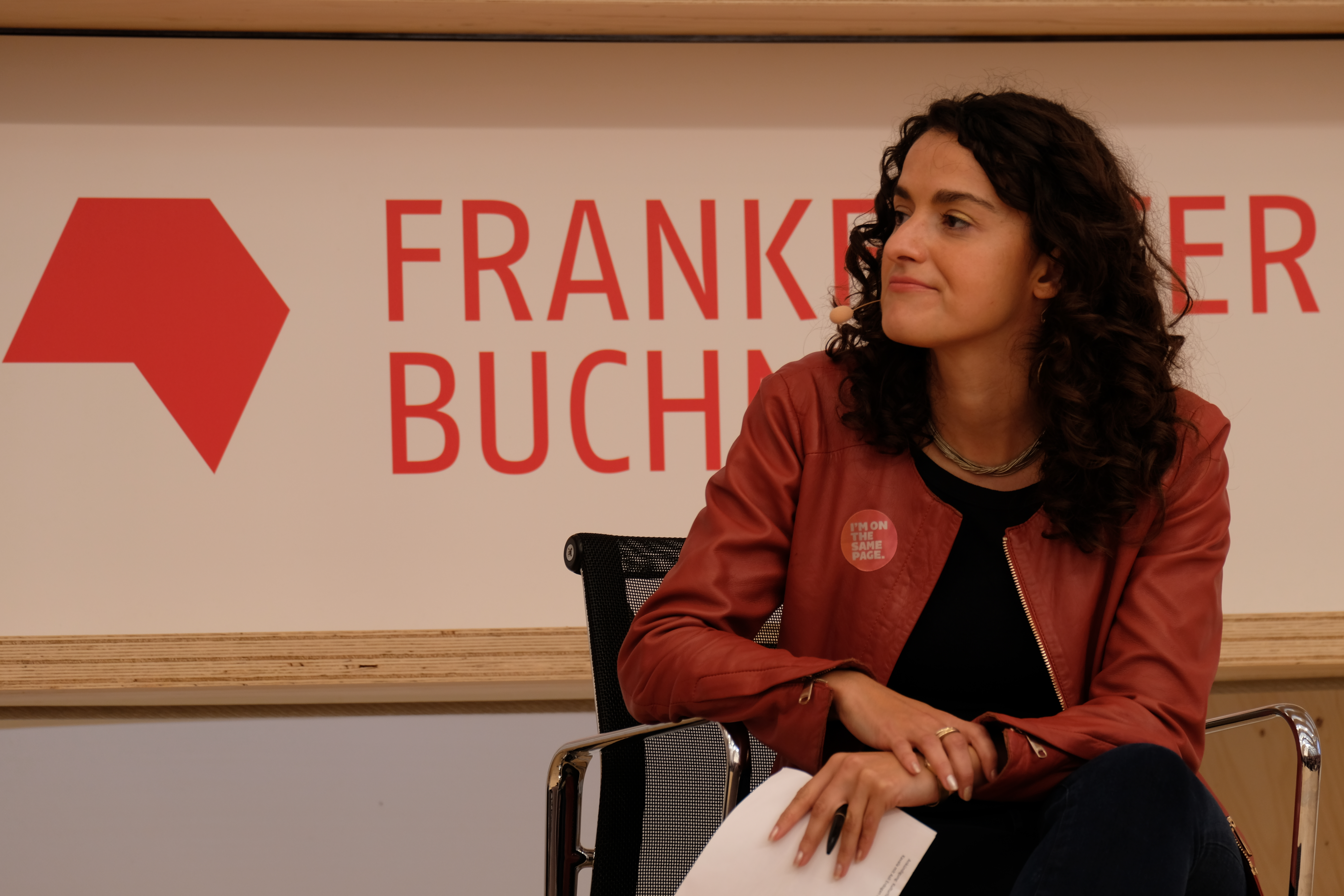 Esra Kücük auf der Frankfurter Buchmesse 2018